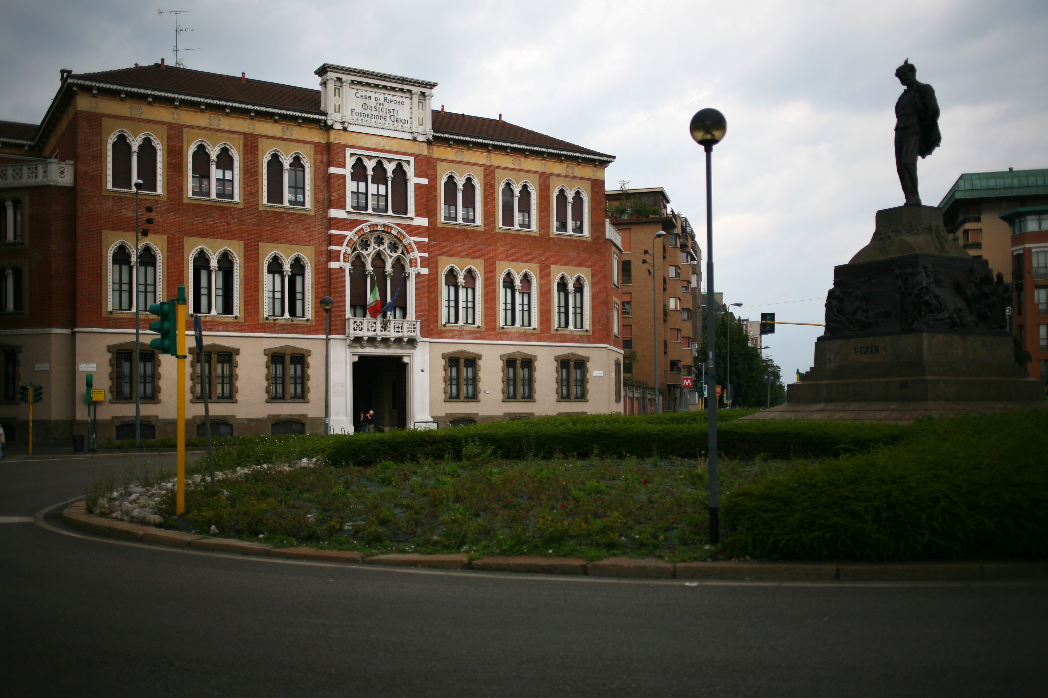 Casa di riposo per musicisti Giuseppe Verdi, Milano; a destra la statua dedicata al Maestro